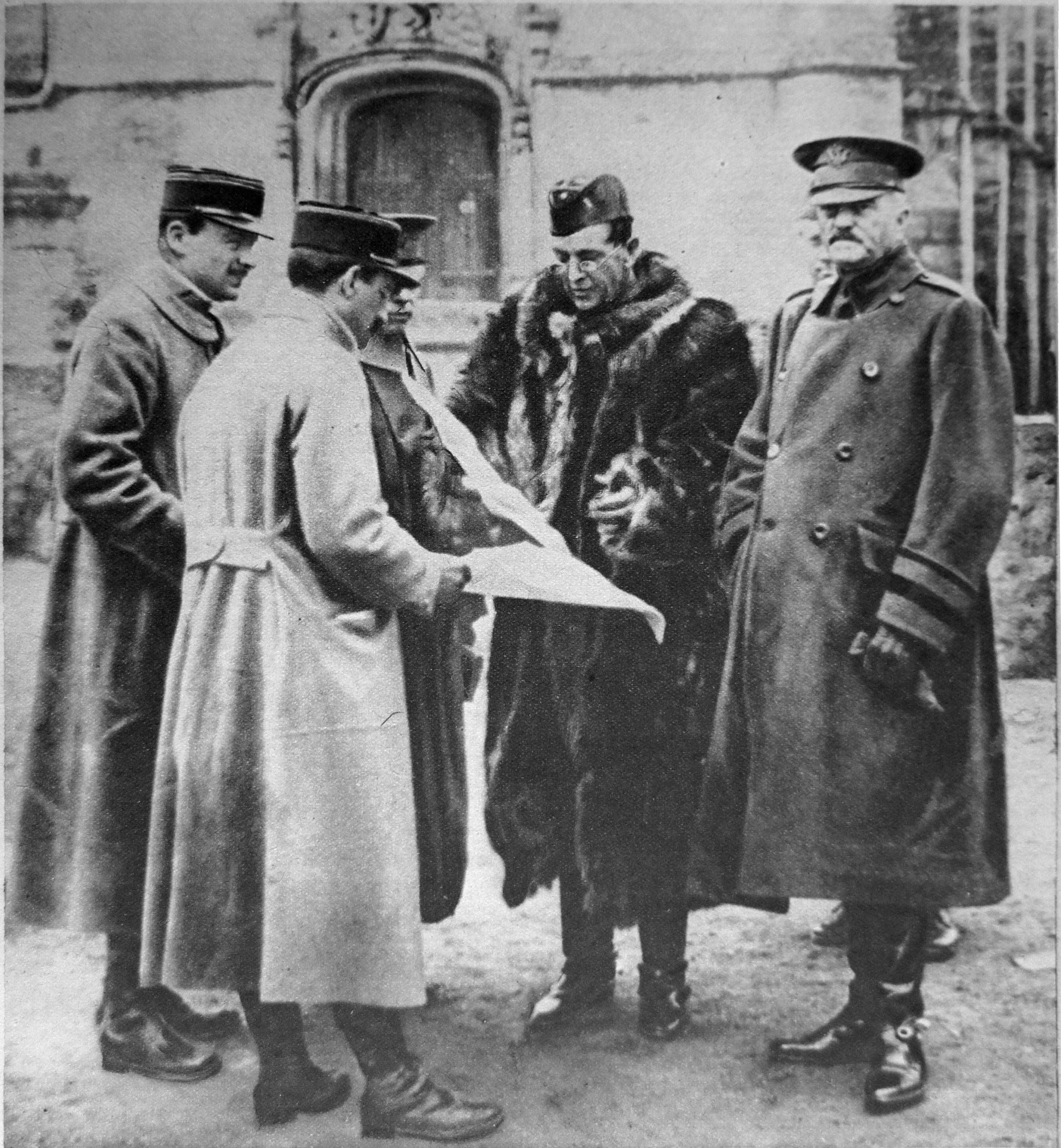 Le Miroir N°235 les généraux Pershing et Bullard.